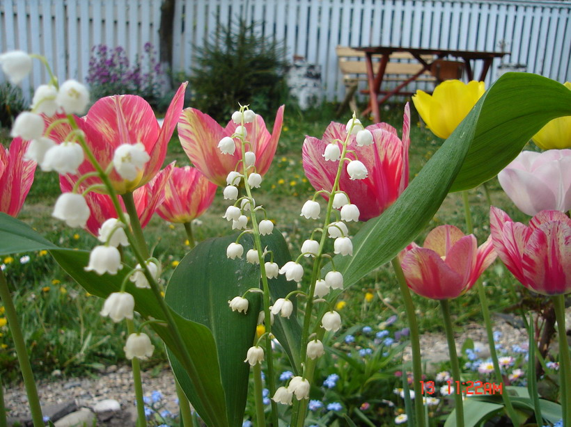 Tulipán (Tulipa) és illatos csengettyűvirág (?) (Adenophora liliifolia?), Székelyföld